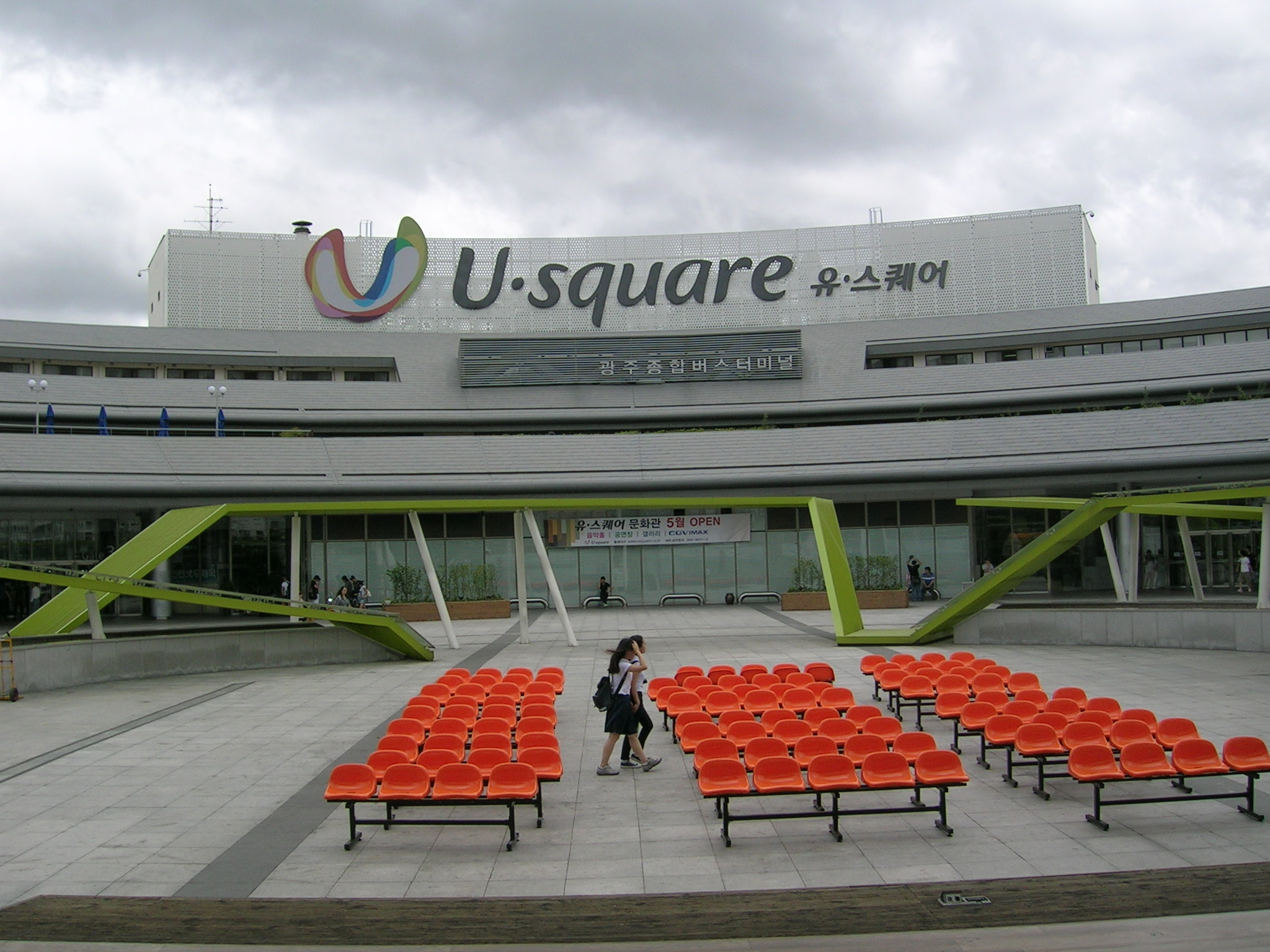 유스퀘어 전경